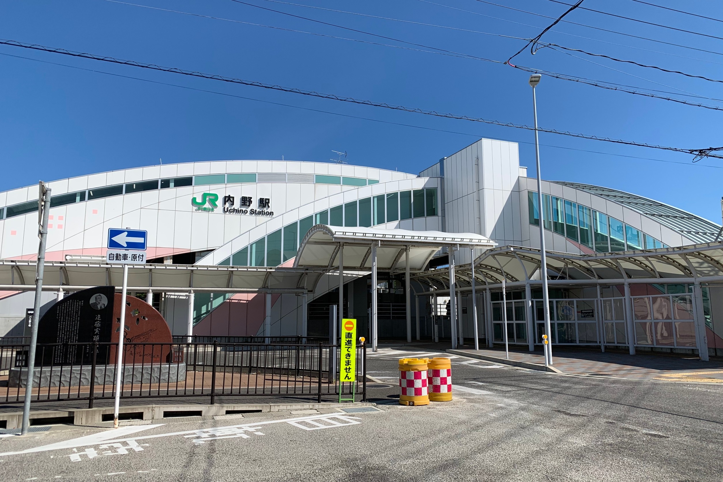 内野駅南口（2020年6月）